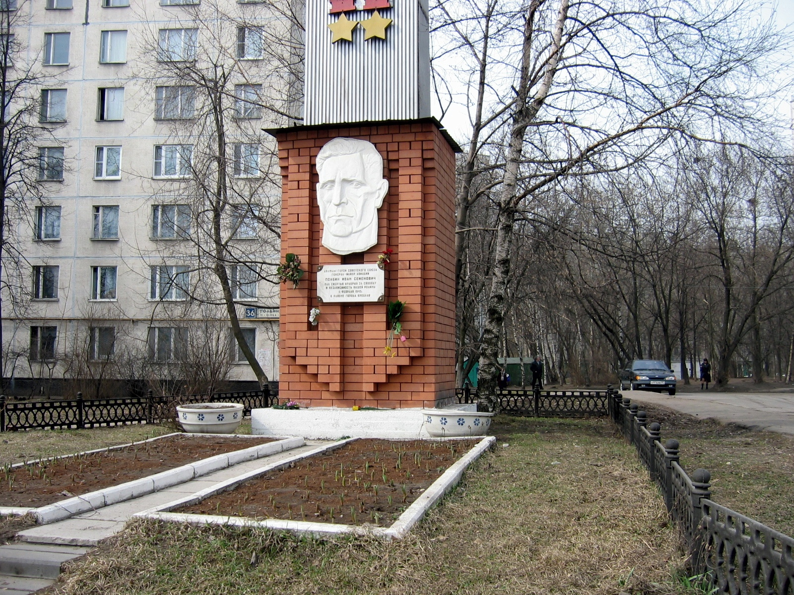 Памятник дважды Герою Советского Союза Ивану Семёновичу Полбину на улице, названной его именем.